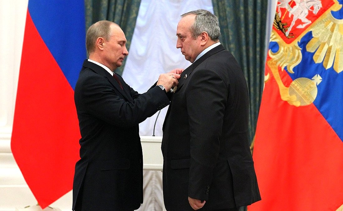 Орденом Александра Невского награждён заместитель председателя комитета Государственной Думы по обороне Франц Клинцевич